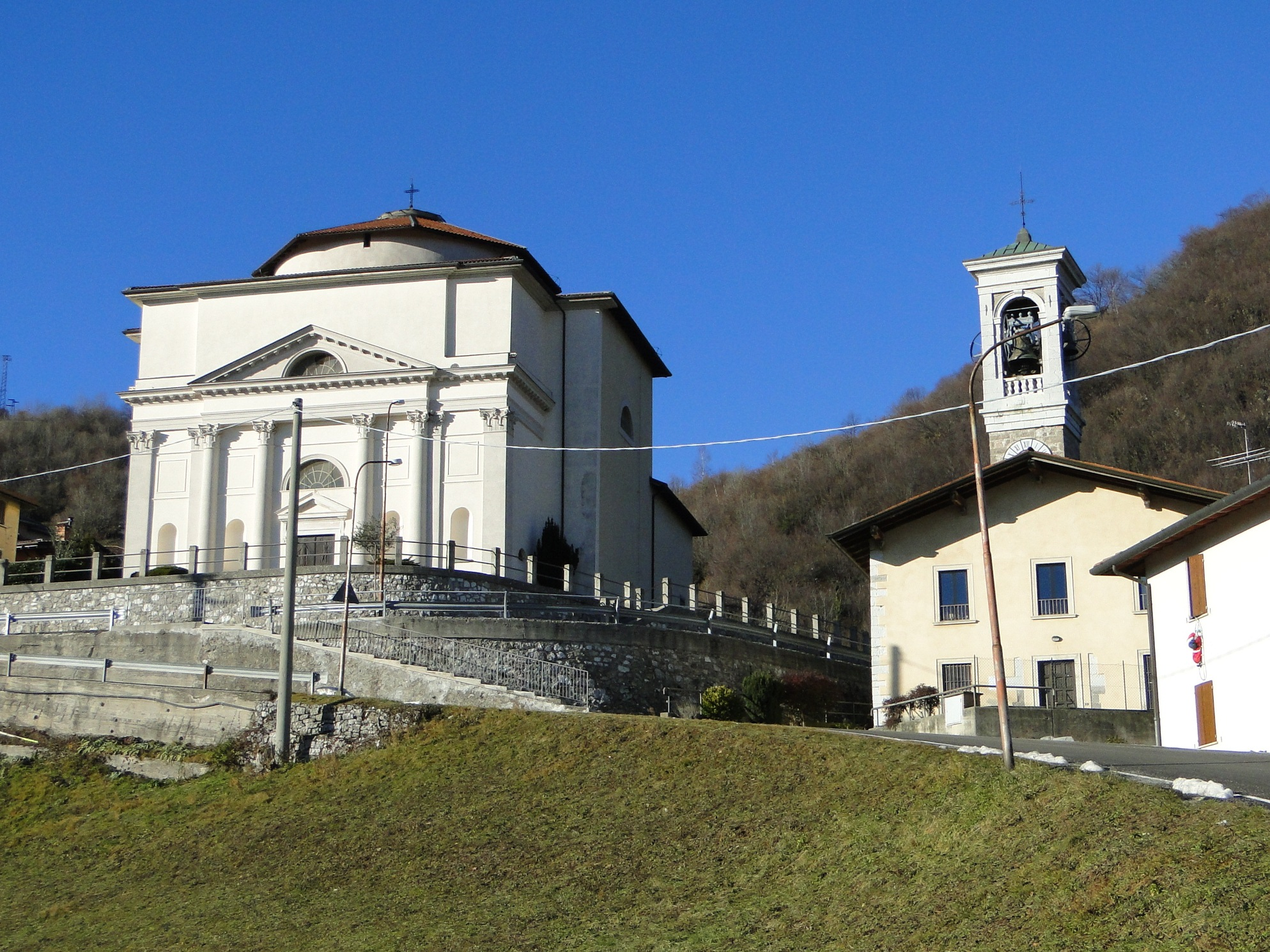 Monte di Nese, fraz. di Alzano Lombardo (BG). Chiesa della Natività di Maria con vecchia parrocchiale